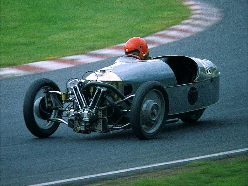 Morgan Threewheeler mit JAP-Motor, Baujahr 1932 (ca. 1100 cm³), gefahren von William Tuer beim Oldtimer-Grand-Prix 1977 auf dem Nürburgring. Höchstgeschwindigkeit auf der Zielgeraden: 152 km/h. Das Foto zeigt das Fahrzeug bei knapp über 80 km/h in der Südkehre.